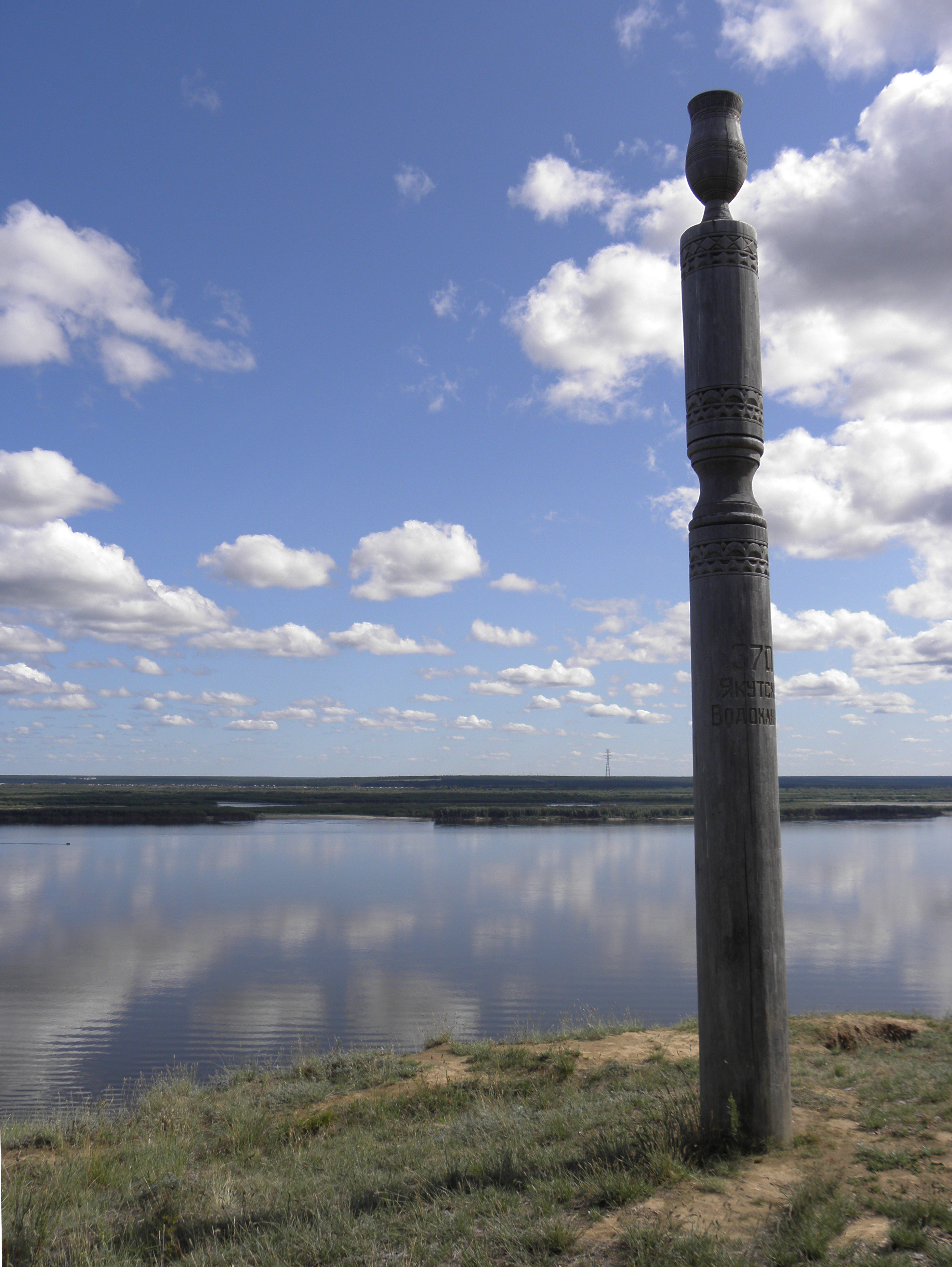 Сэргэ, установленный на Табагинском мысе, на берегу реки Лены